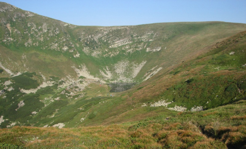 Бребенескул